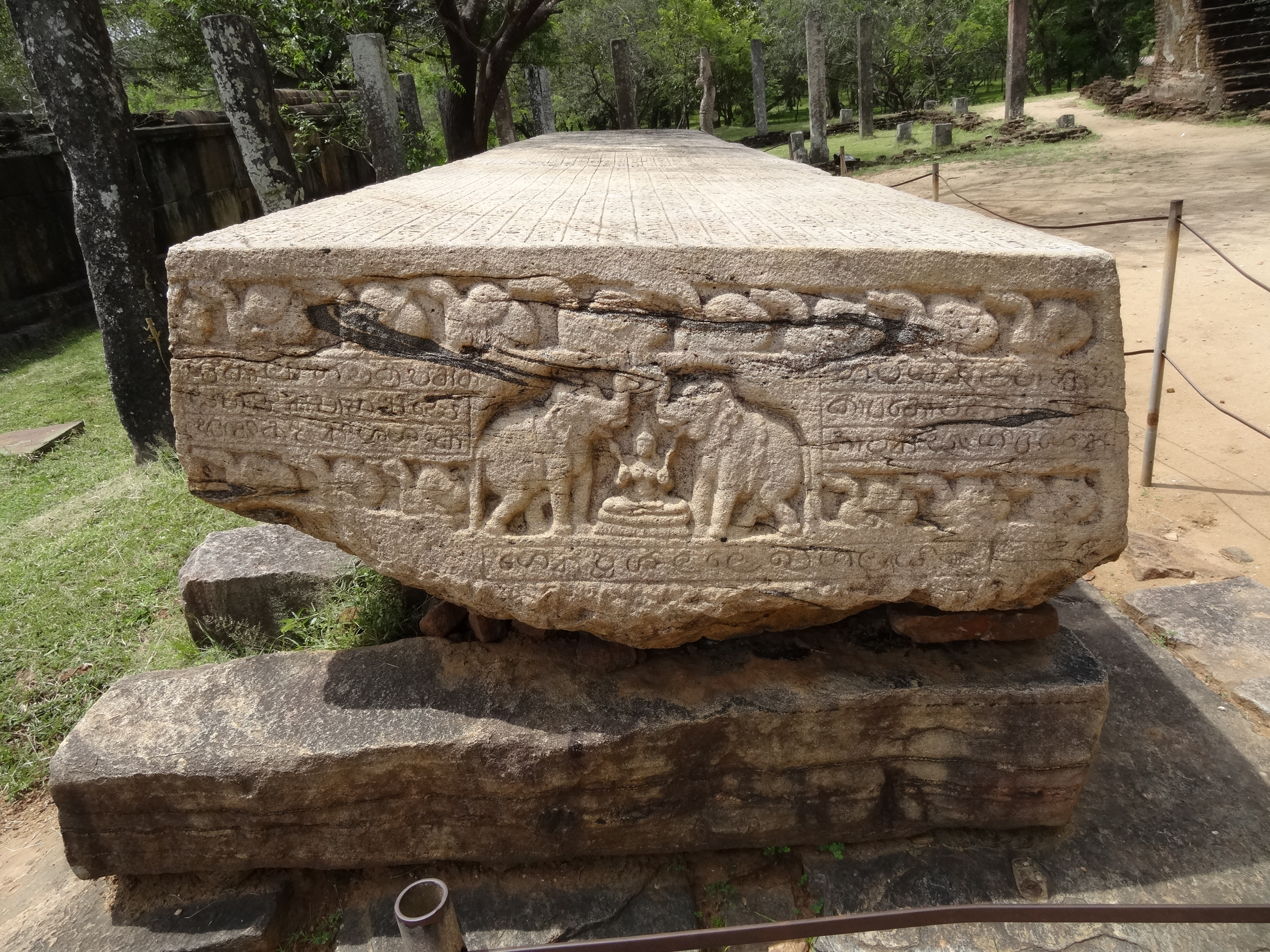 Gal Potha